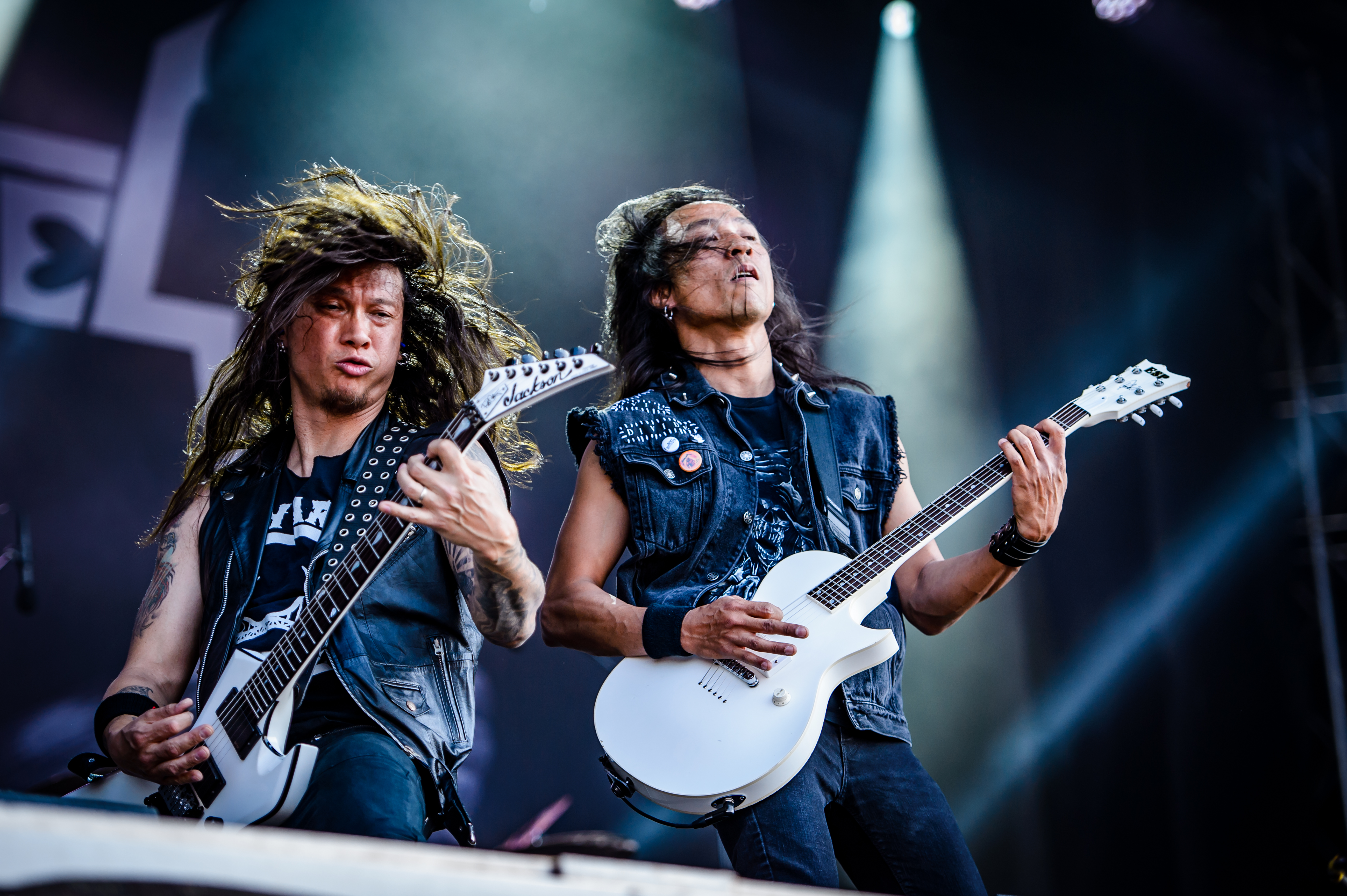 'RockHarz Open Air 2017; Ballenstedt': 'Death Angel'